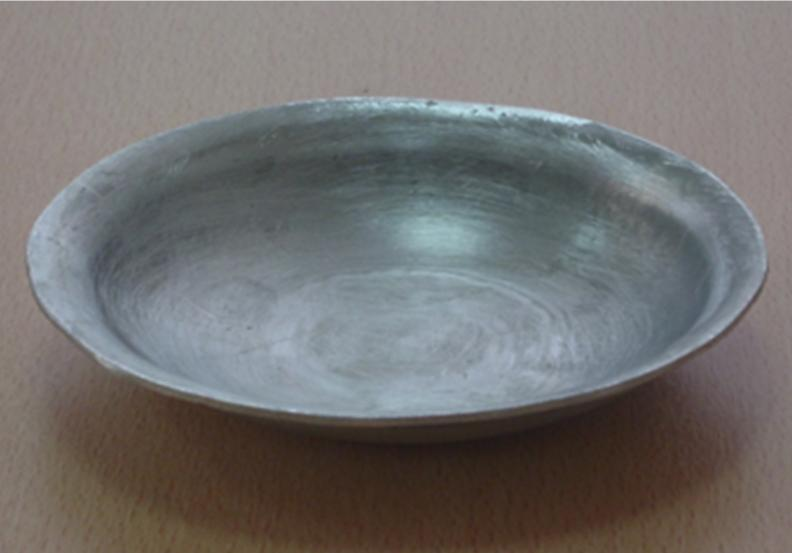 Опытный образец, изготовленный при помощи деформировании льда за счет его энергии расширения